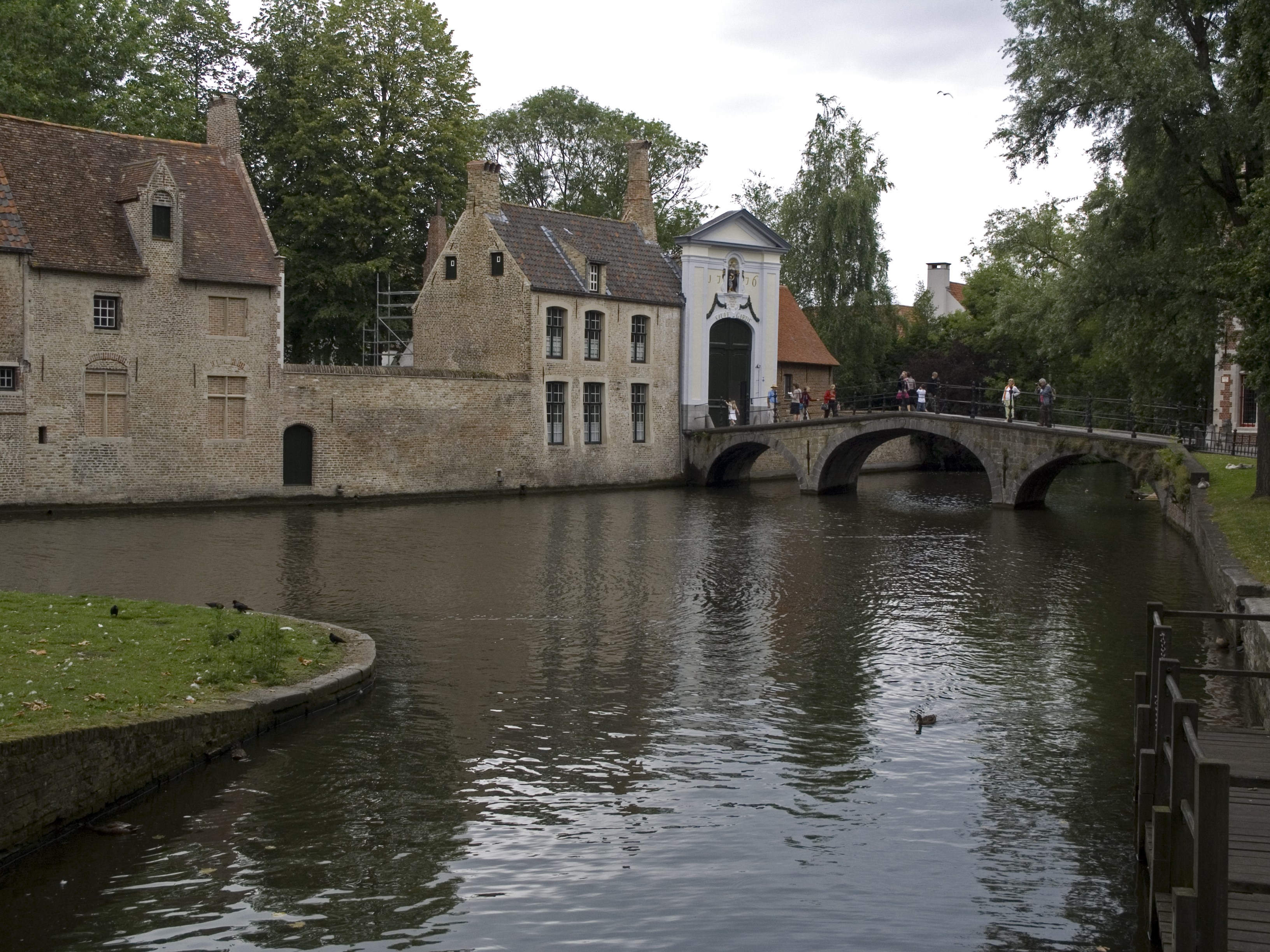 Брюгге, канал